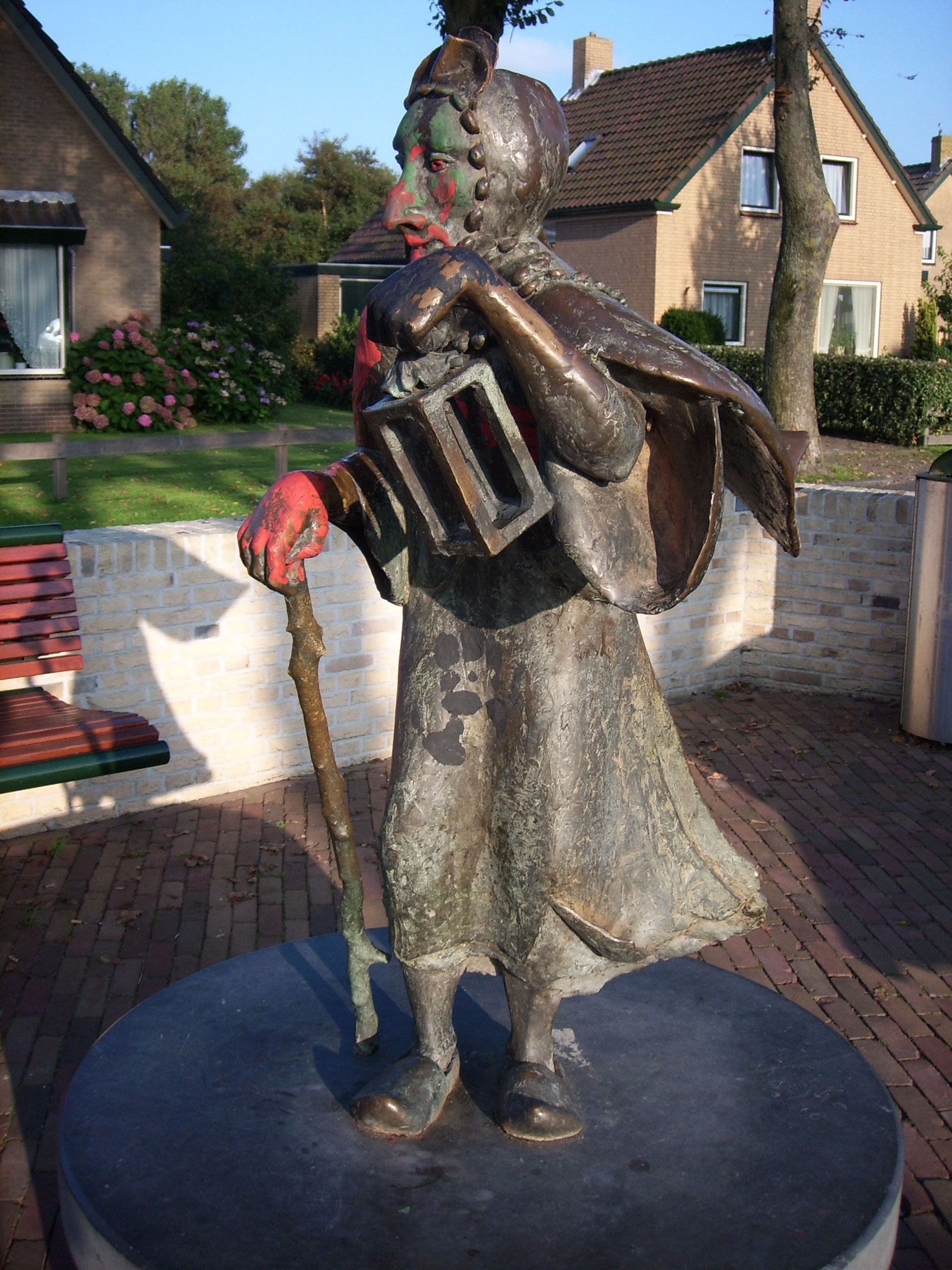 Standbeeld van Rixt van het Oerd (Foto Ruben A. Koman, 2010).